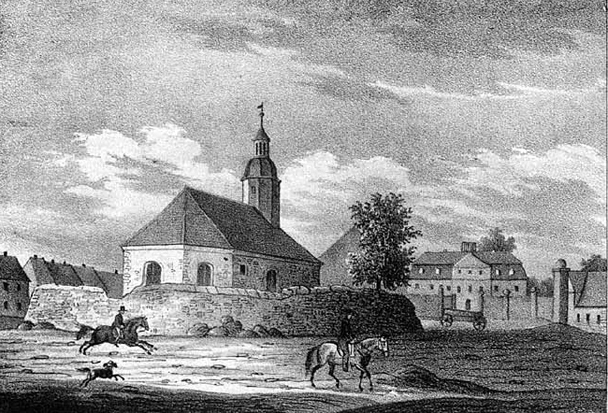 Die Lößniger Kirche um 1840